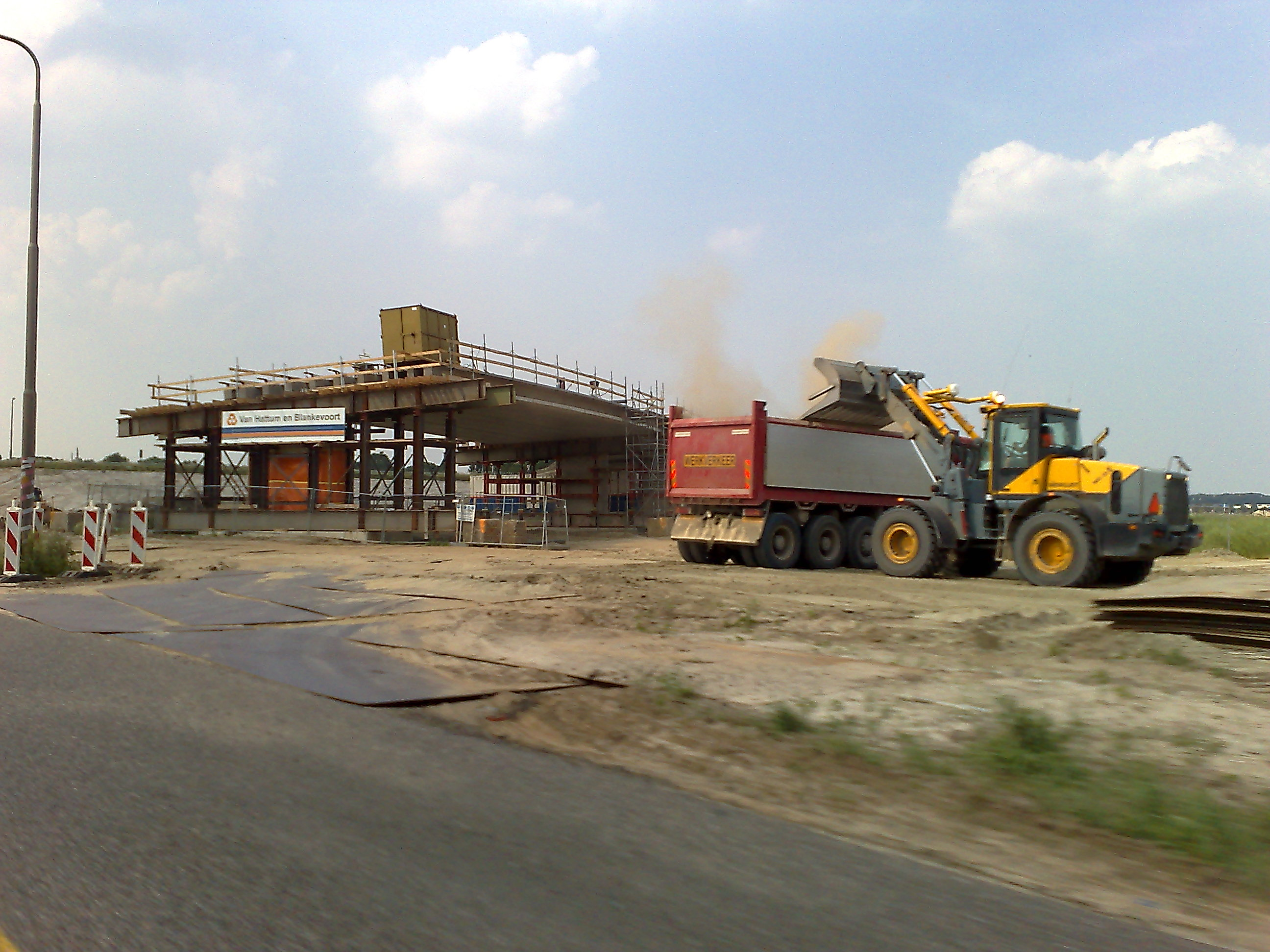 Rijksweg A2, knooppunt Empel